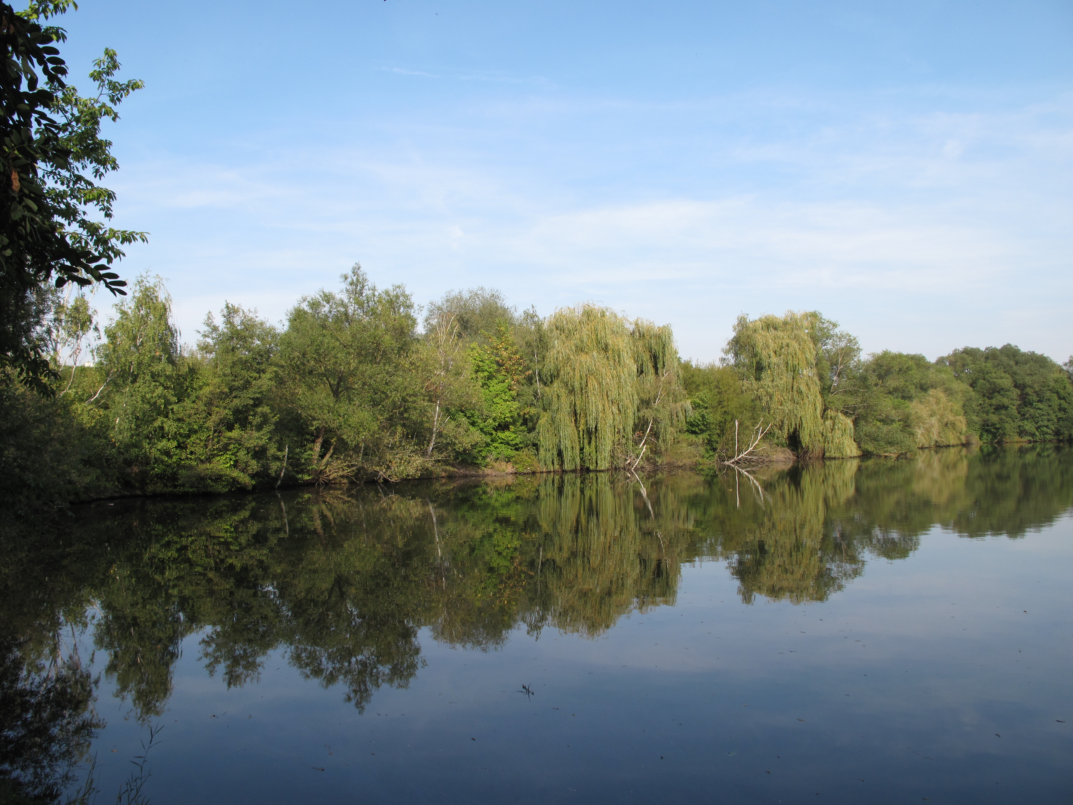 Xaverovský rybník I. Praha, Česká republika.